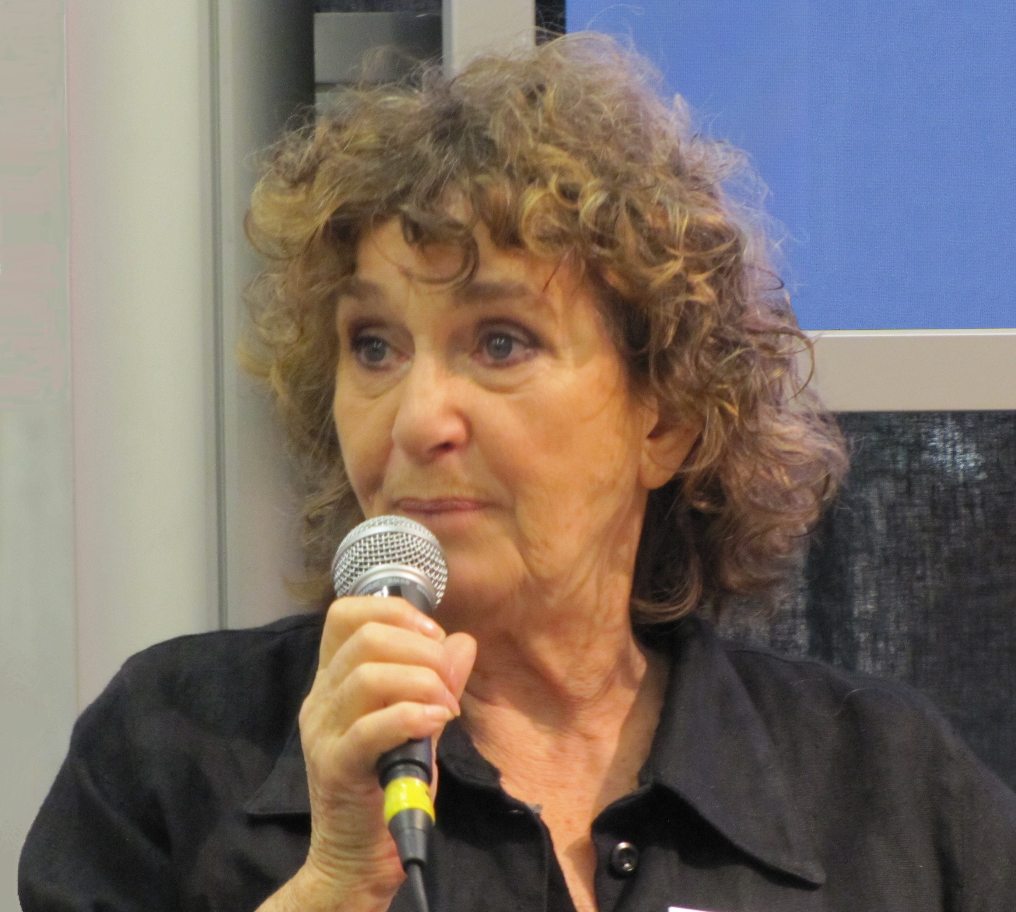 Schlagerartisten Siw Malmkvist på Bokmässan 2010.